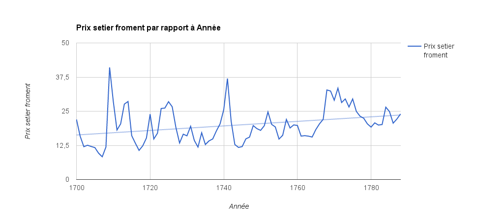 Courbe représentant l'évolution du prix du setier de froment au XVIIIe siècle de 1700 à 1788 dans la ville de Paris année par année.